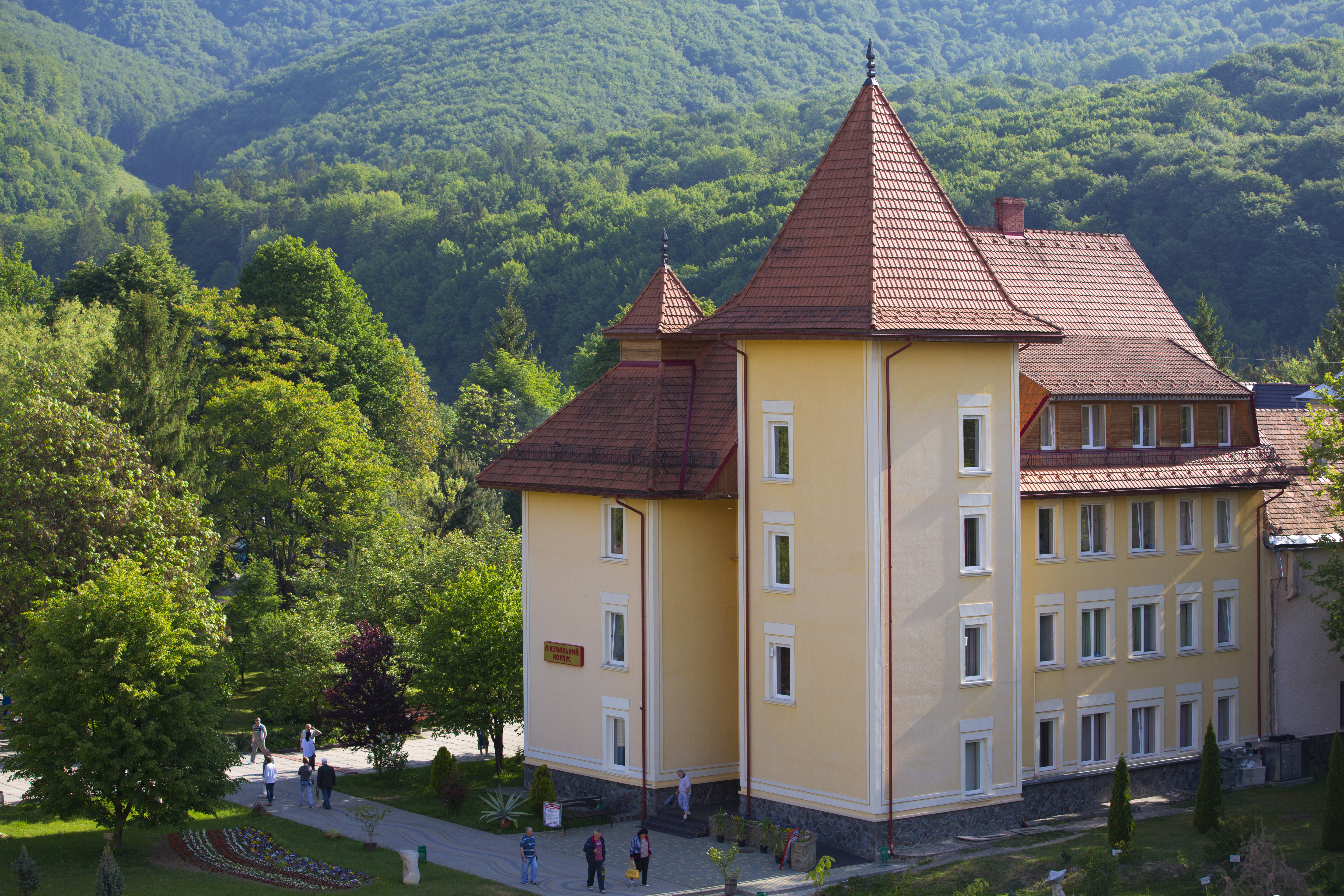 Территория санатория Квитка Полонины, лечебный корпус санатория.